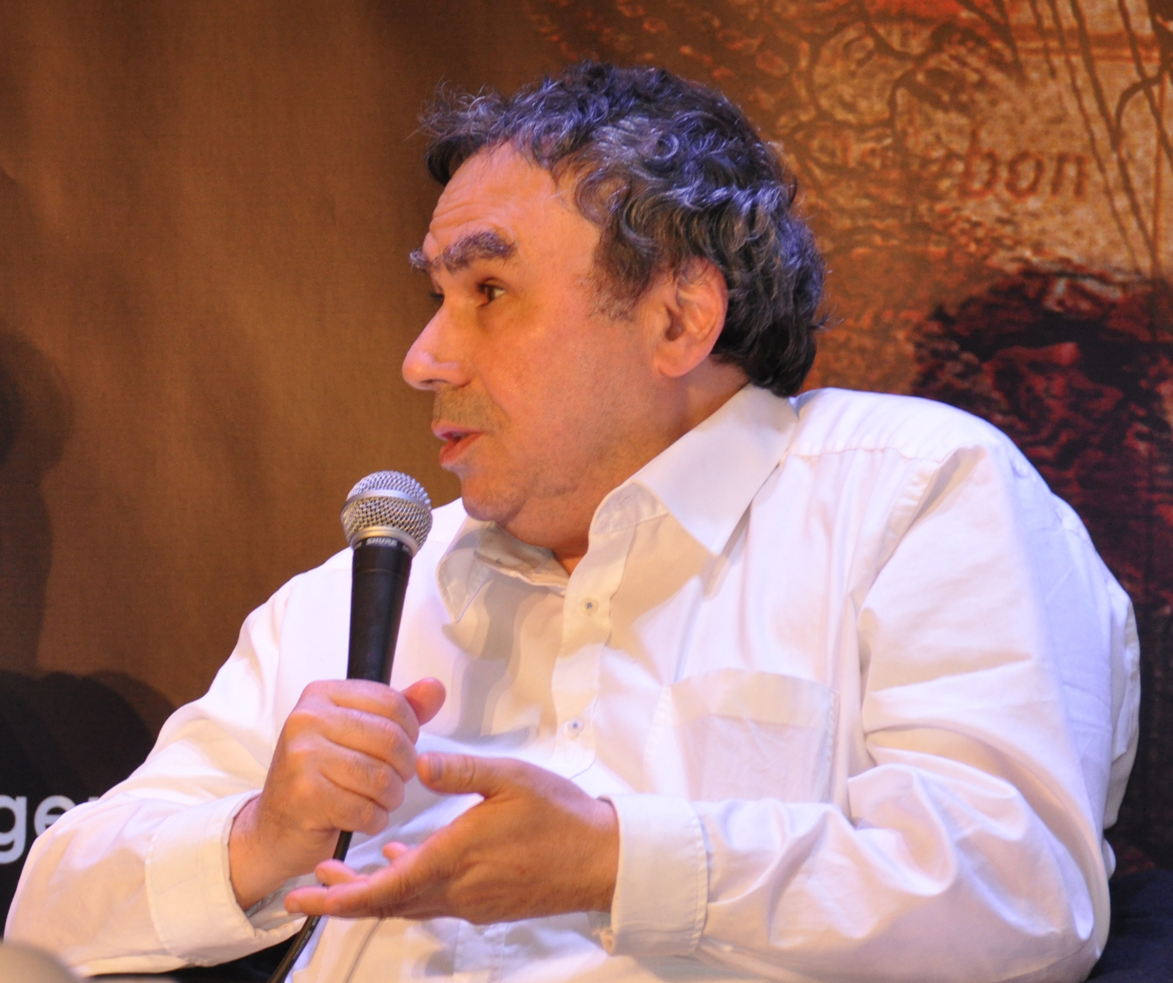 Festival Etonnants voyageurs 2015